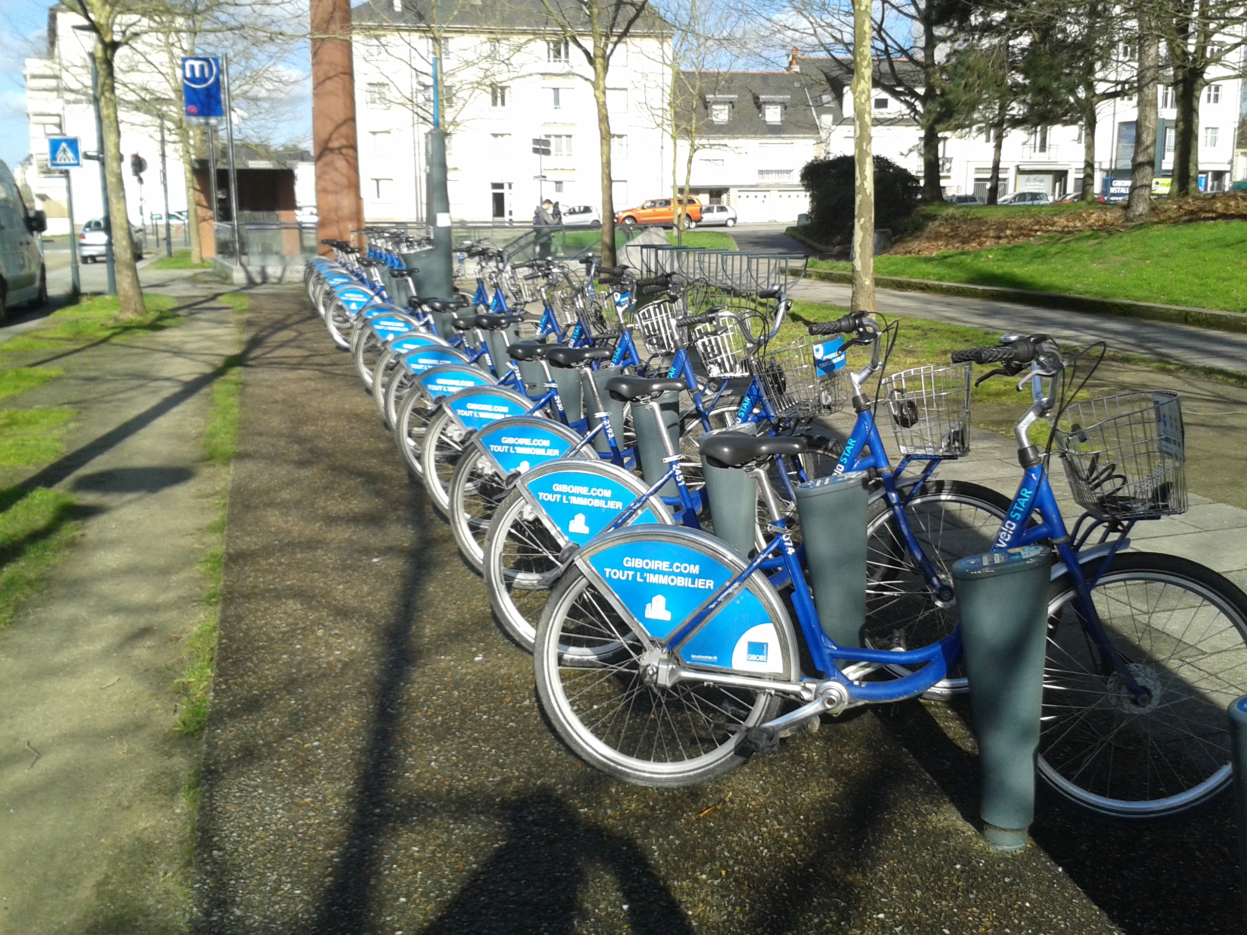 Station Clémenceau du vélo STAR à Rennes (Bretagne, France), boulevard Henri Fréville